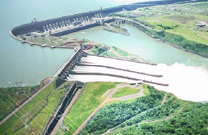 Itaipu, Usina de Itaipú Figura Aérea 2 Maior Hidrelétrica do mundo Foz do Iguaçú Paraná Brasil